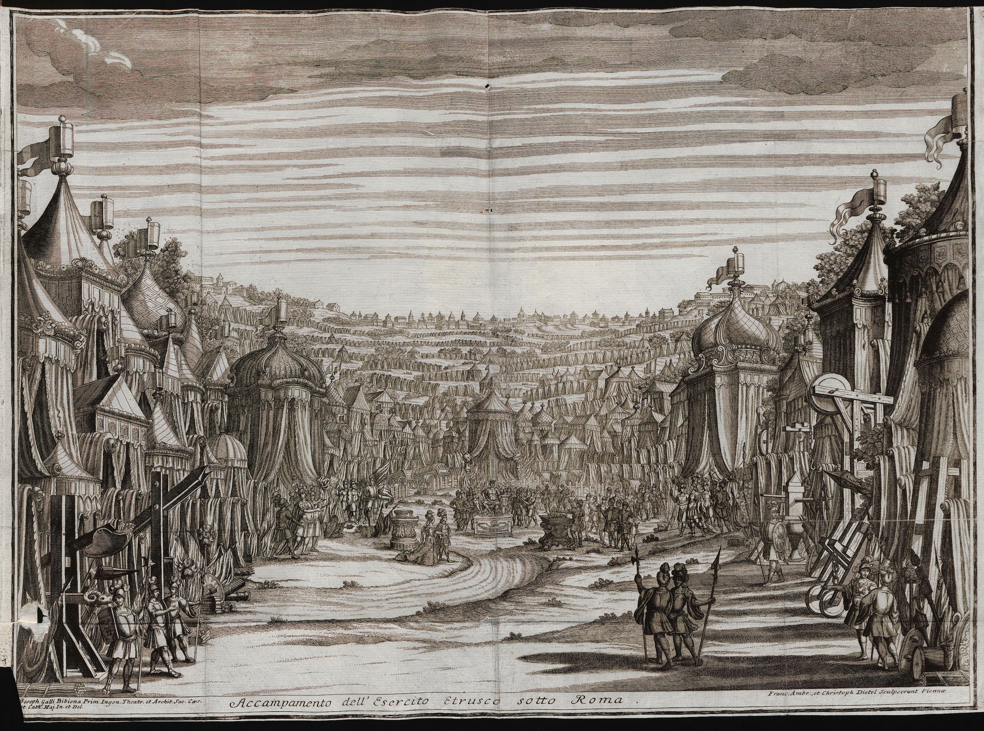 Grafik aus dem Klebeband Nr. 15 der Fürstlich Waldeckschen Hofbibliothek Arolsen Costanza e fortezza, Oper von Johann Joseph Fux (Musik), Pietro Pariato (Libretto), uraufgeführt 28. August 1723 in Prag zur Krönung Karl VI. zum König von Böhmen. Theaterarchitektur und Bühnenbilder von Giuseppe Galli da Bibiena. Motiv: "Accampamento dell'Esercito Etrusco sotto Roma" Bühnenbild: Lager des etruskischen Heeres vor Rom, in der Mitte Porsenna auf dem Thron, links Valeria und Tarquinio, auf dem Altar rechts brennt die Flamme, in die Mucius Scaevola seinen Arm hält